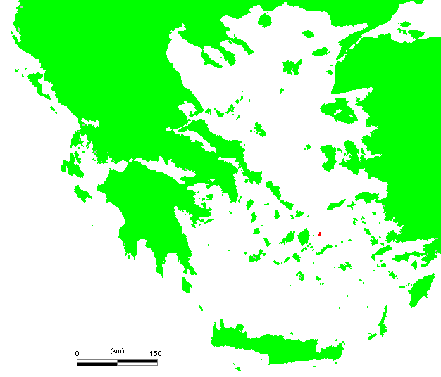 GR Donousa.PNG (Greek island)